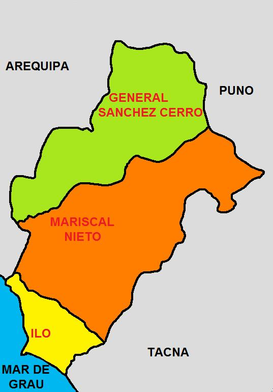 Imagen que muestra la División Politica del Departamento de Moquegua, una de las 25 circunscripciones en que se divide el Perú